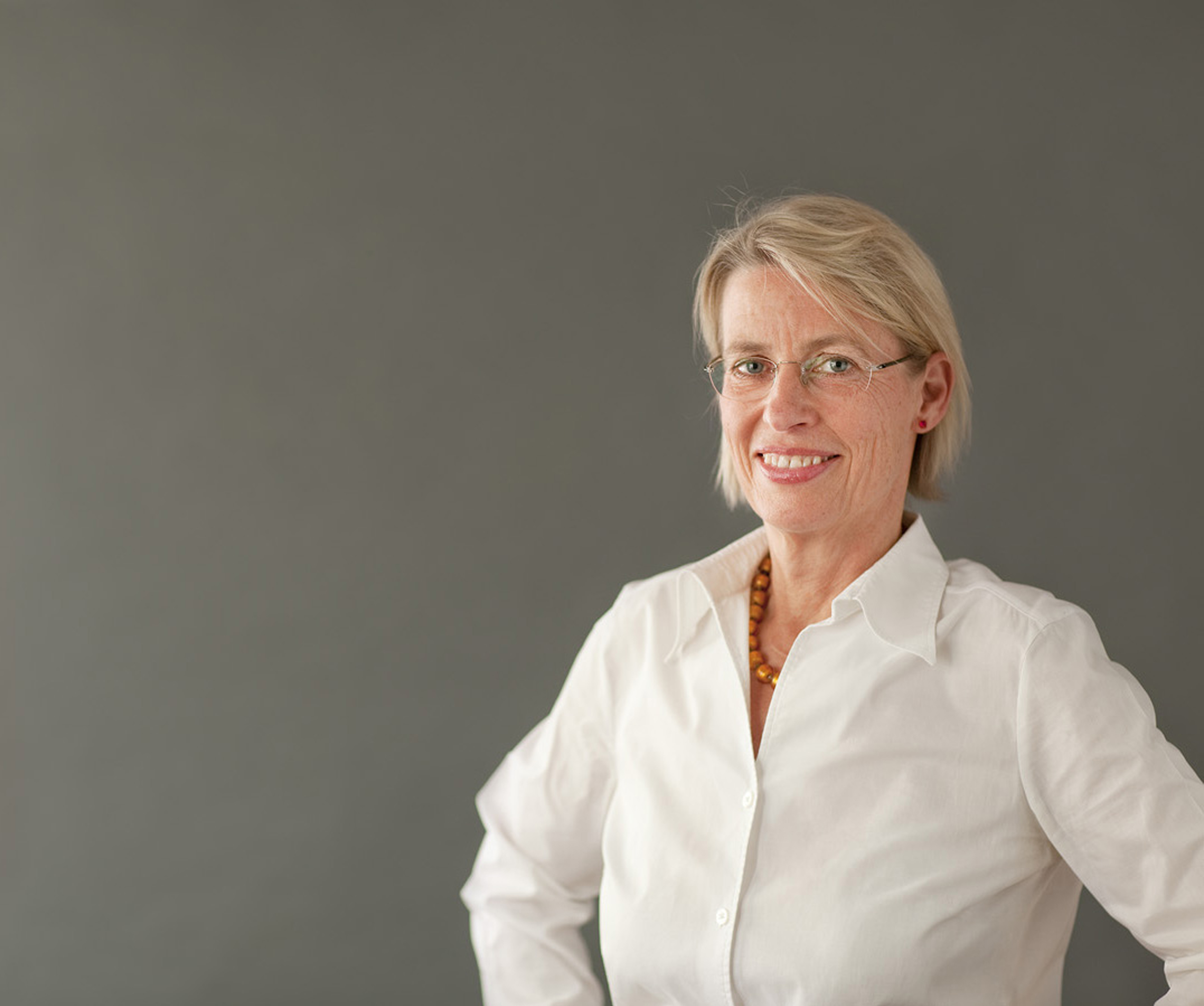 Portrait Picture of Ulrike Brandi